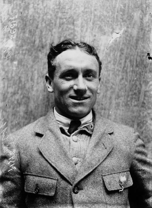 Philippe Thys lors du Paris-Roubaix 1919